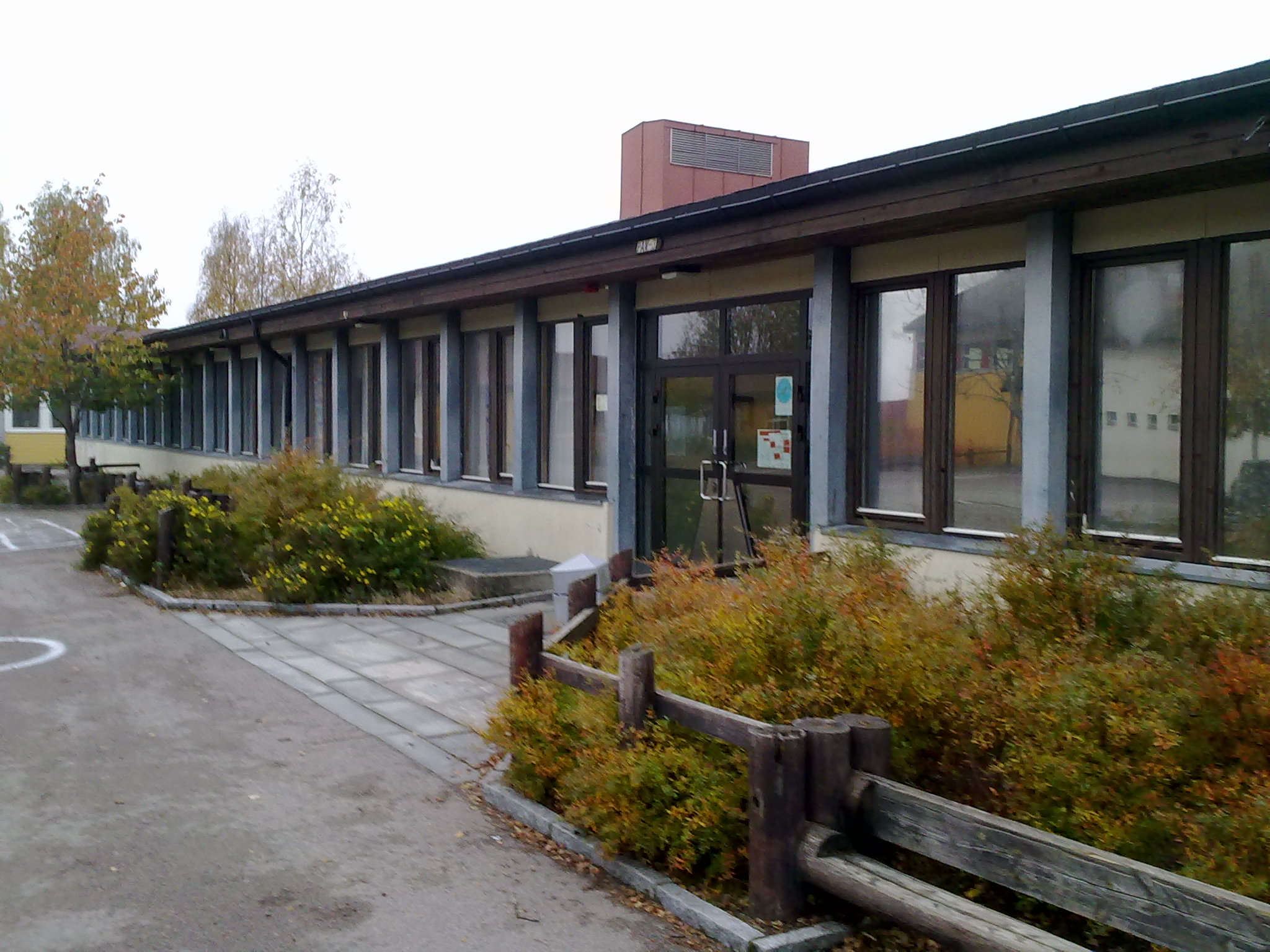 Åsgård skole paviljong 3